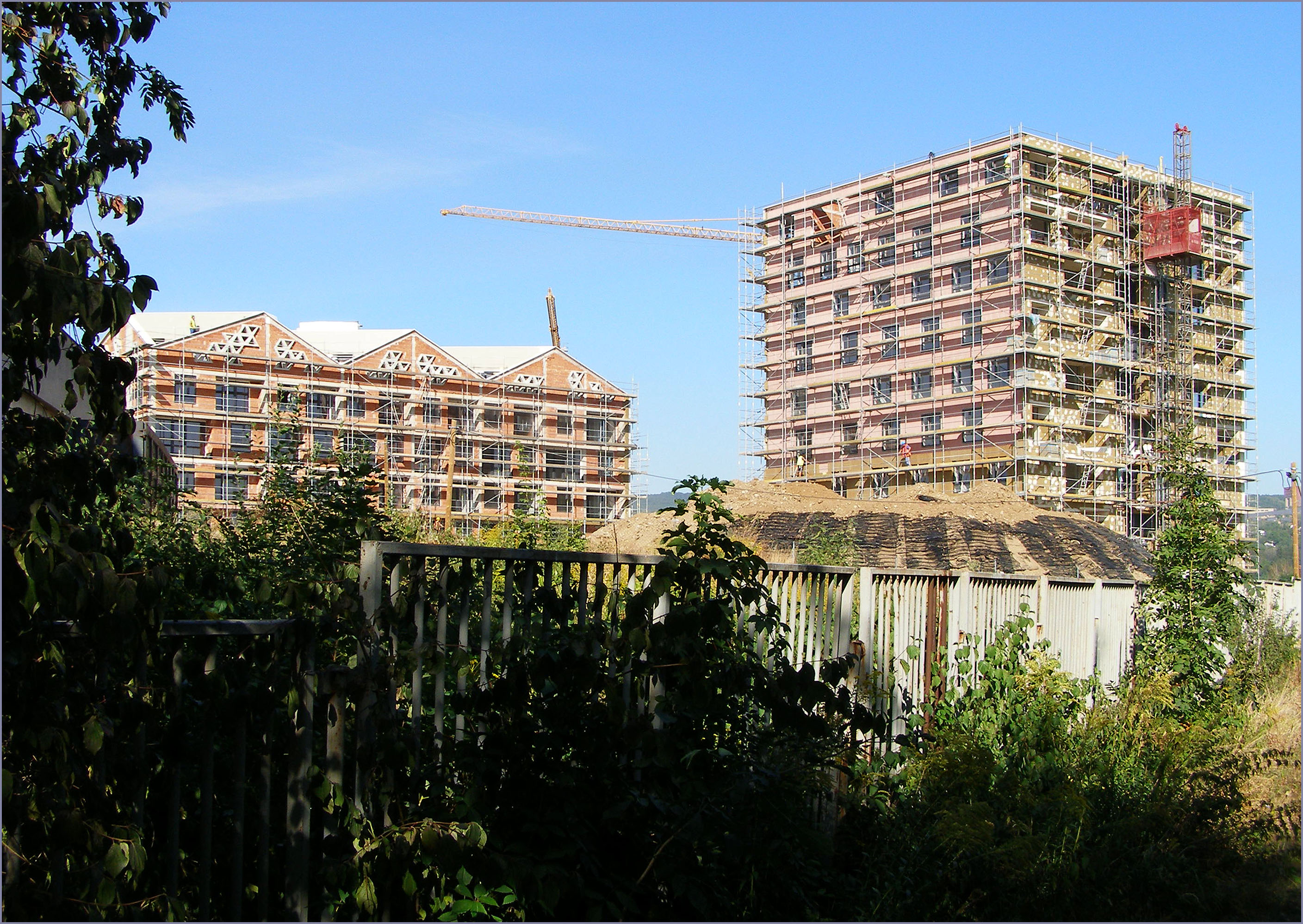 Nová Terasa